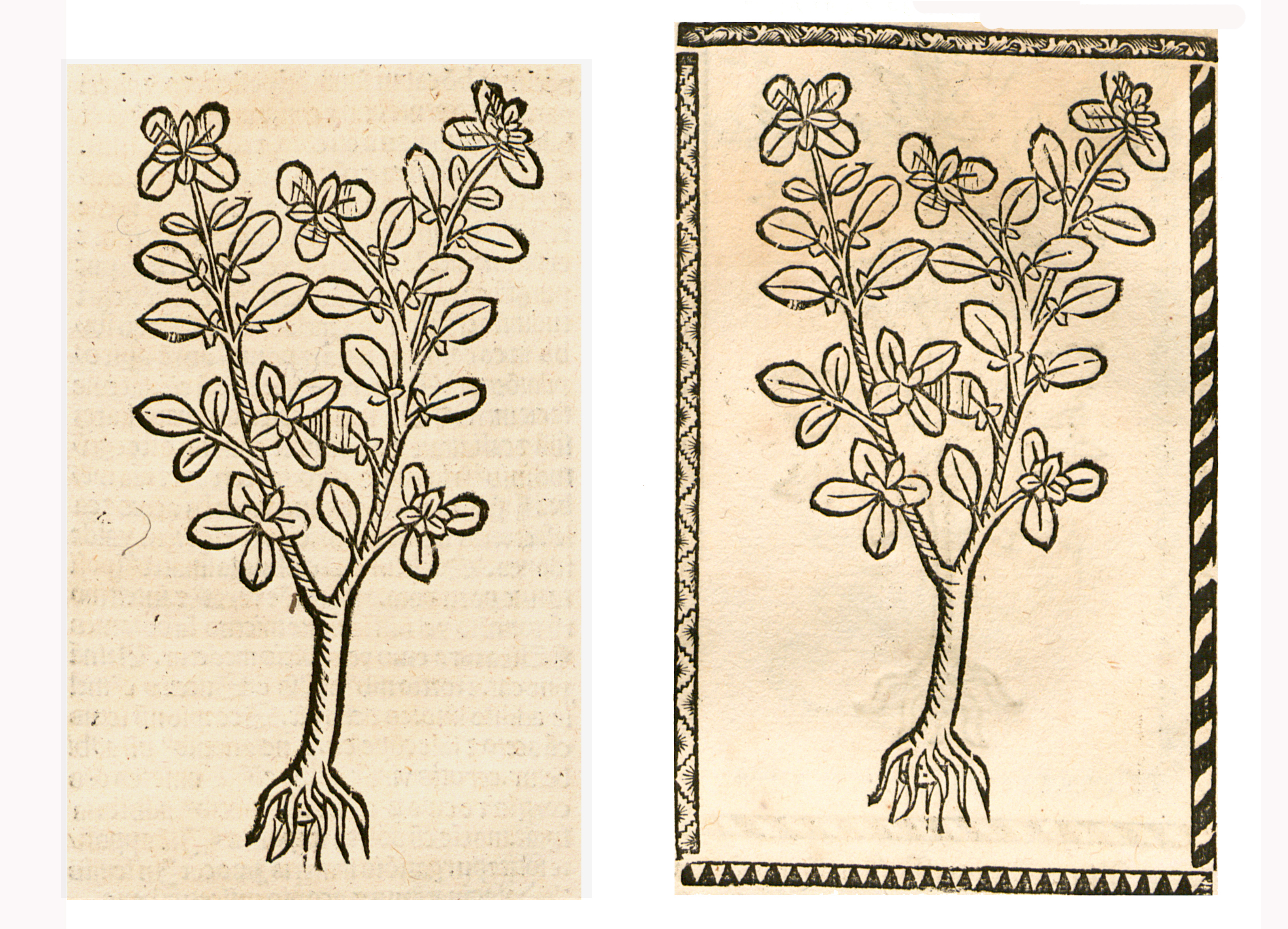 Abbildung von: Cliben